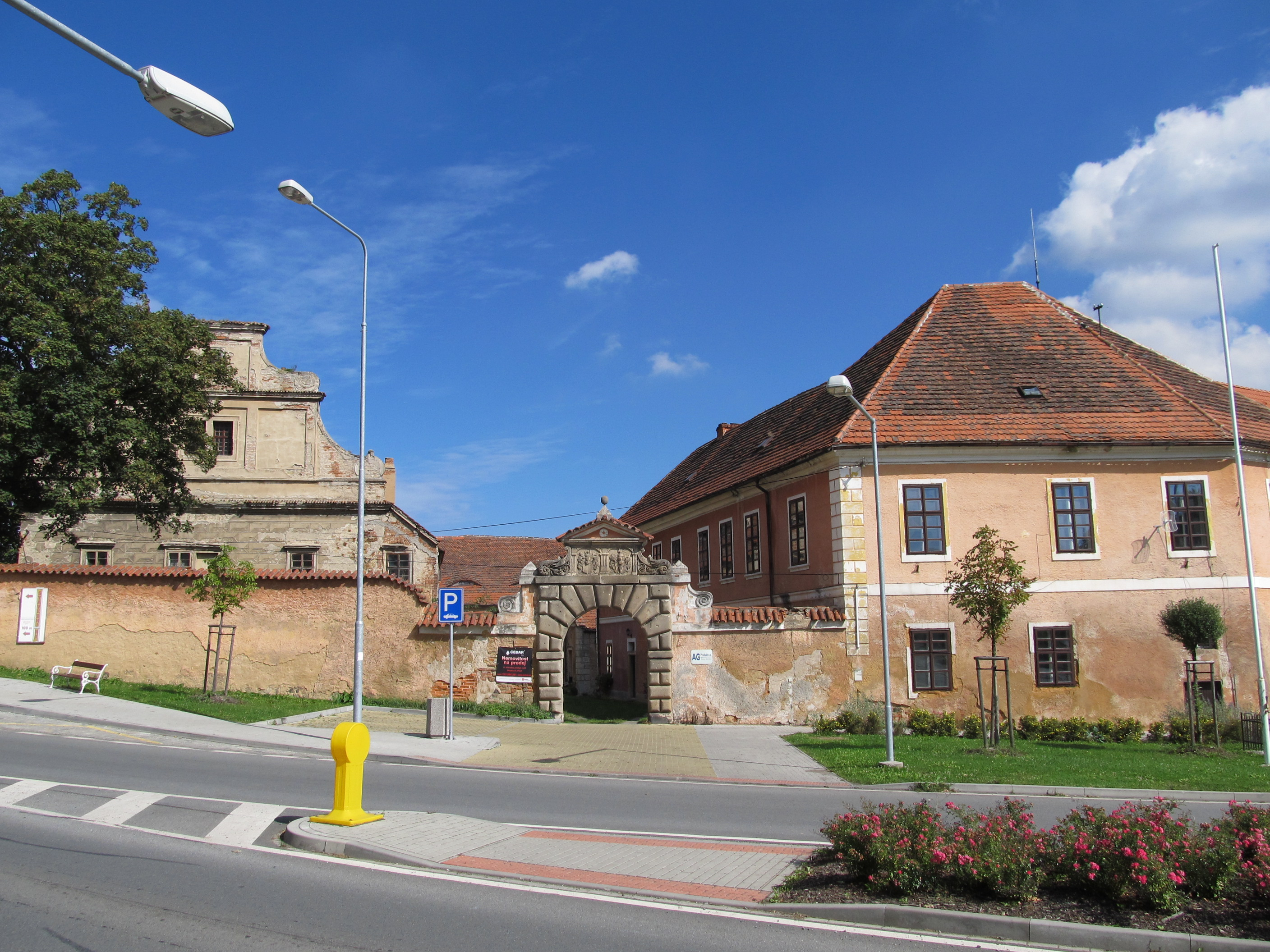 Šťáhlavy, zámek